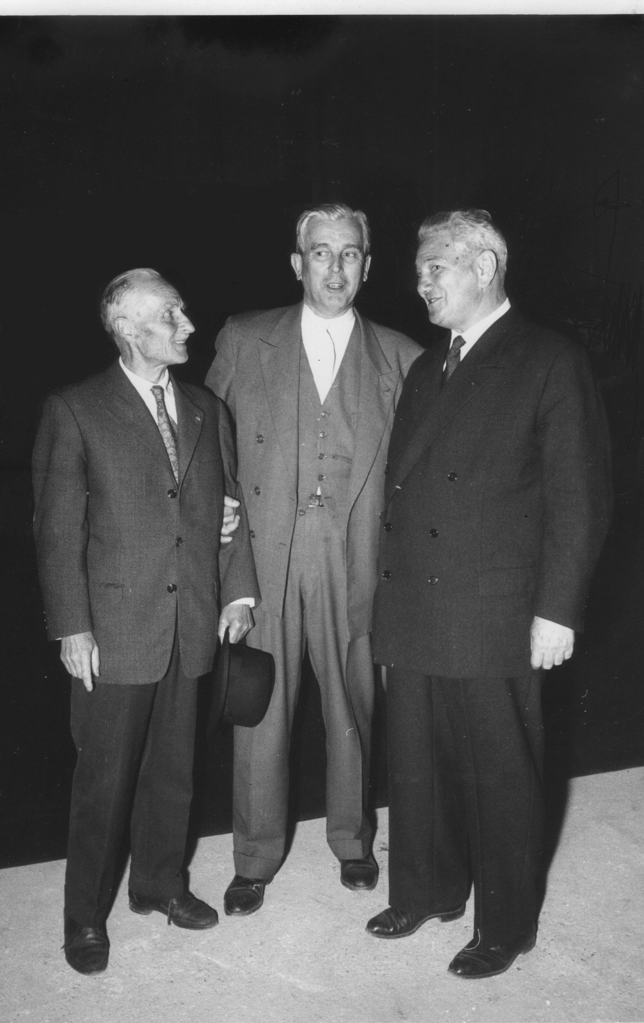 à gauche : Marcel Petit, Inspecteur général des Écoles nationales vétérinaires, au centre : Noël Le Maresquier, architecte, à droite : Pierre Pons, directeur de l' École nationale vétérinaire de Toulouse, lors de la pose de la première pierre de la nouvelle École vétérinaire de Toulouse en avril 1961